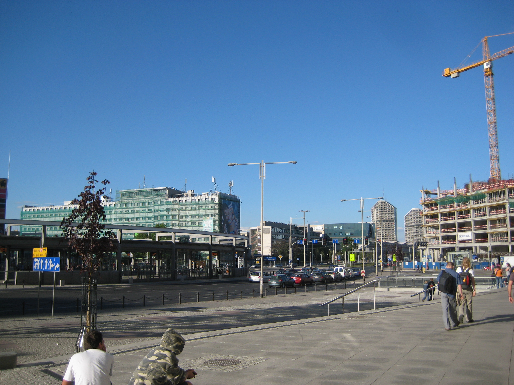 Plac Grunwaldzki (Grunwaldzki Square) in May 2008